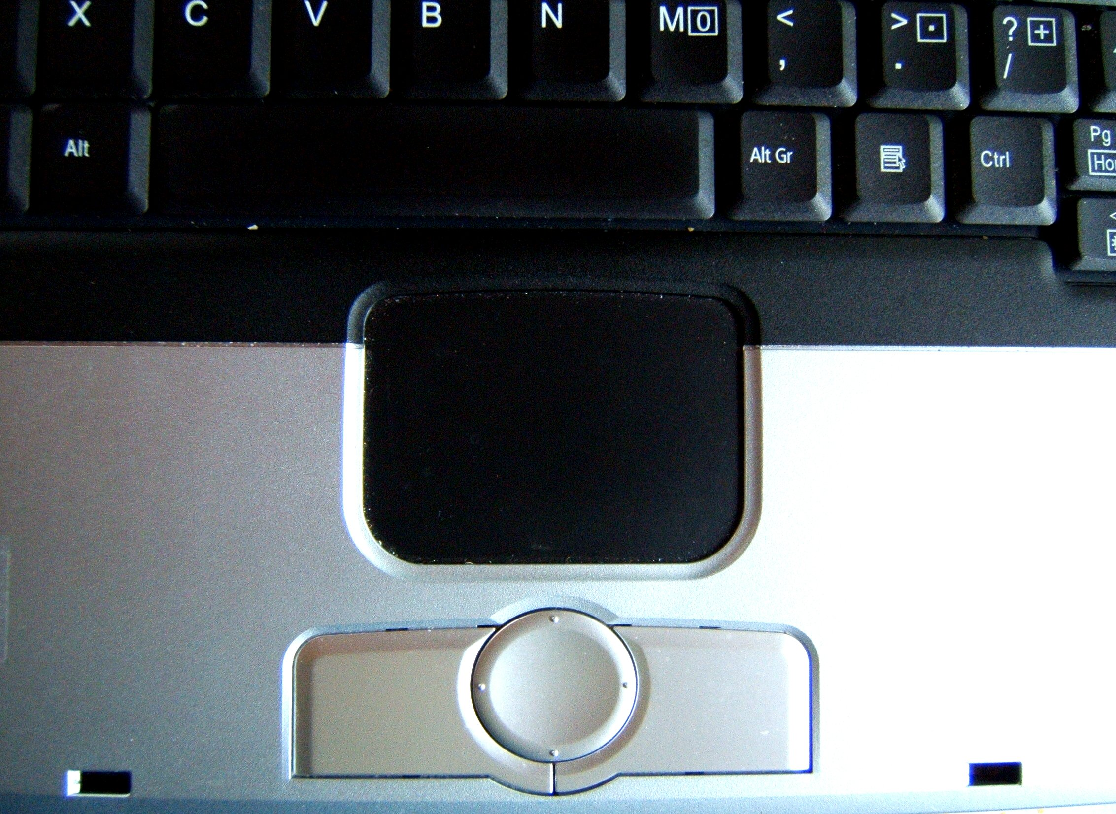 Touchpad van laptop